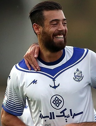 آرش افشین